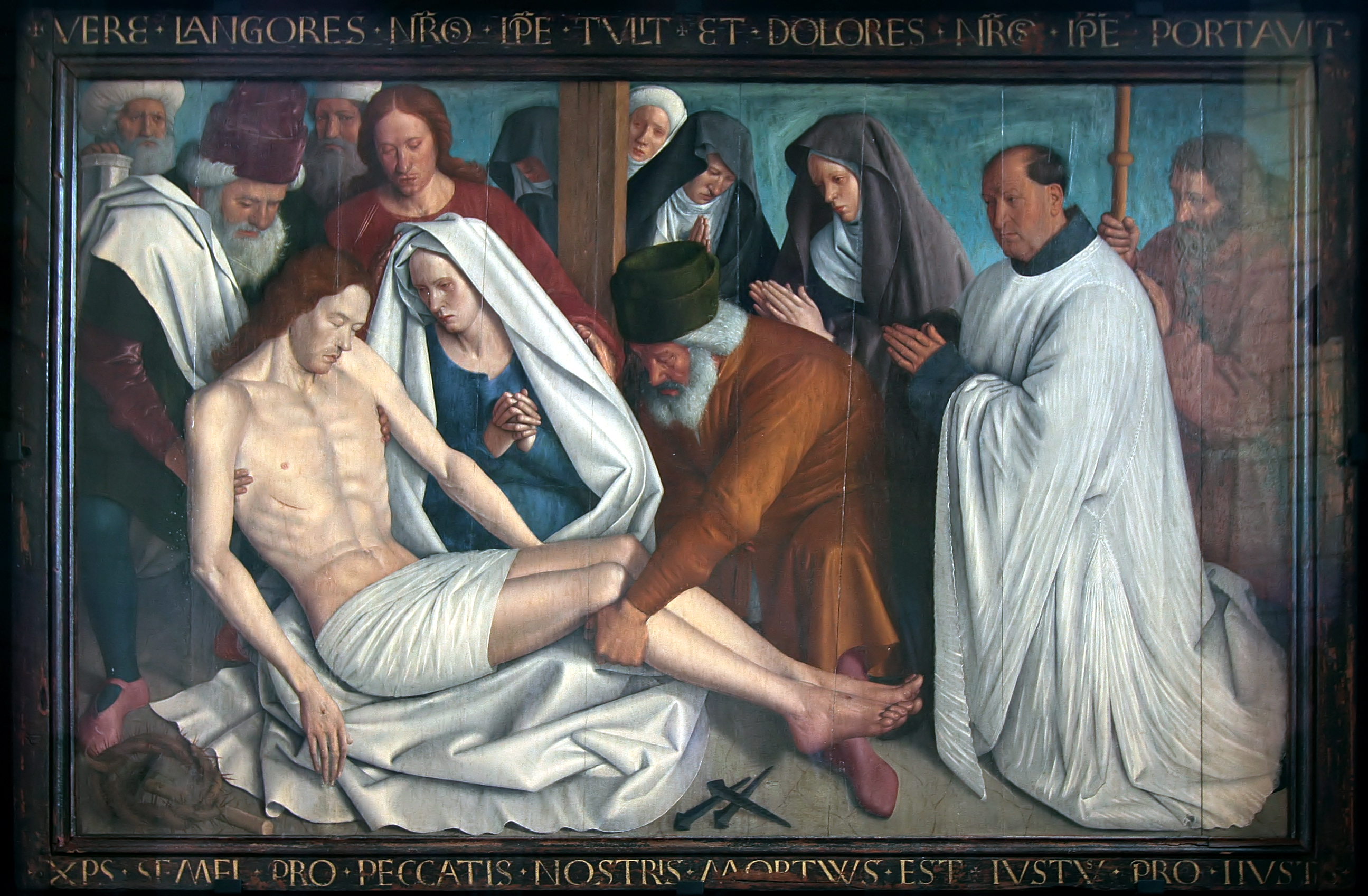 Stiftskirche Saint-Martin in der Gemeinde Nouans-les-Fontaines im Departement Indre-et-Loire/Frankreich - Piéta von Jean Fouquet, um 1470